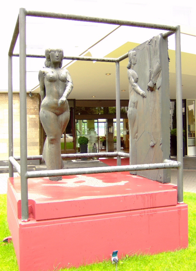 Richard Heß: Gäste im Hotel (Begegnung) (1982/83) vor dem Foyer des Hotels „Königshof“ in Bonn Material: Bronze bemalt Höhe: 3,20 m